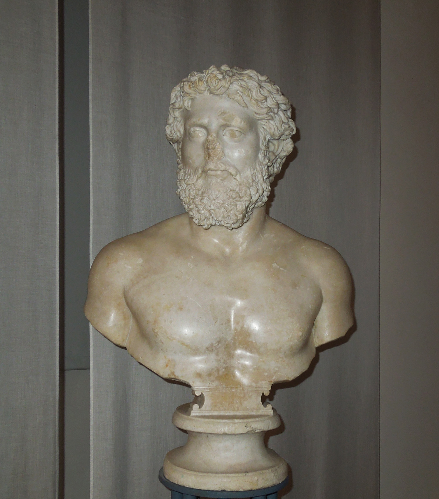 Busto di Settimio Severo eseguito verso la fine del II secolo d.C. È custodito presso il Museo archeologico Francesco Savini di Teramo.